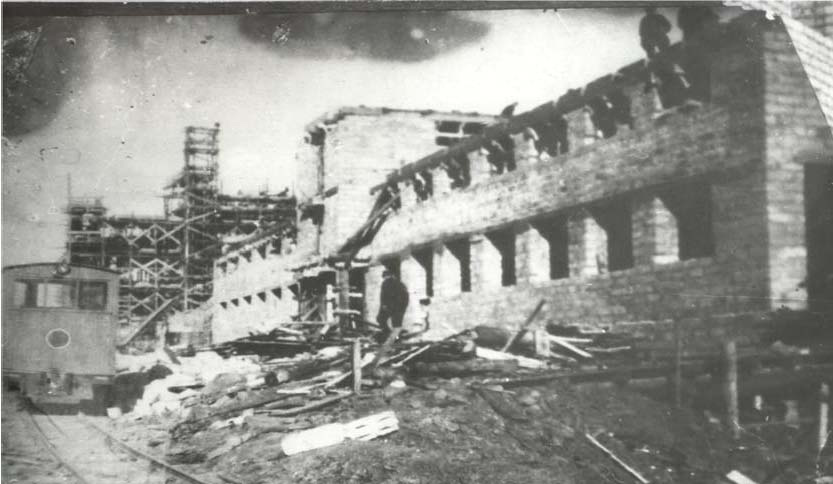 Строительство Майской ГРЭС, недалеко от города Советская Гавань